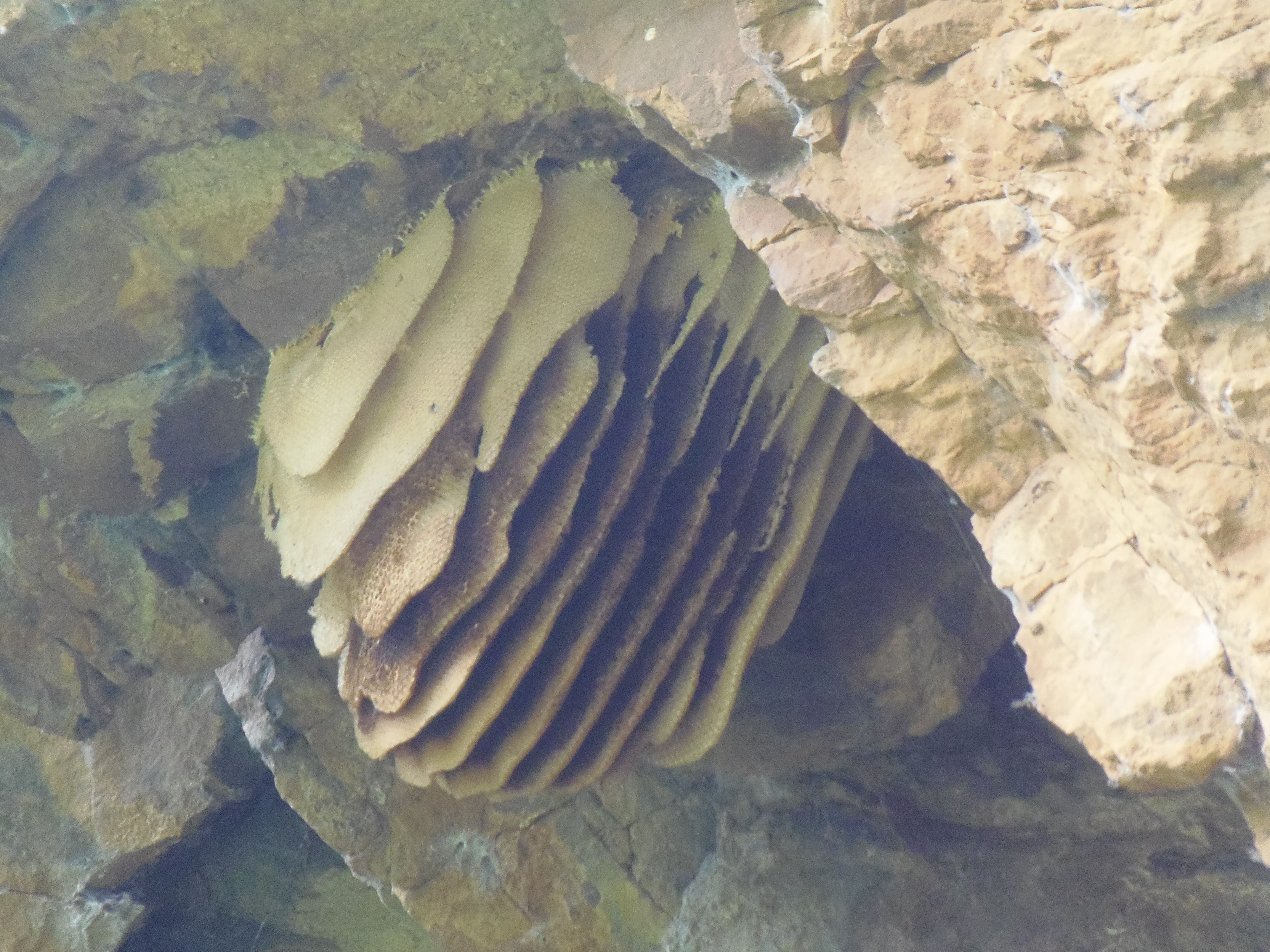 Favo di Ape mellifera sicula. Fiume Milicia, Sicily